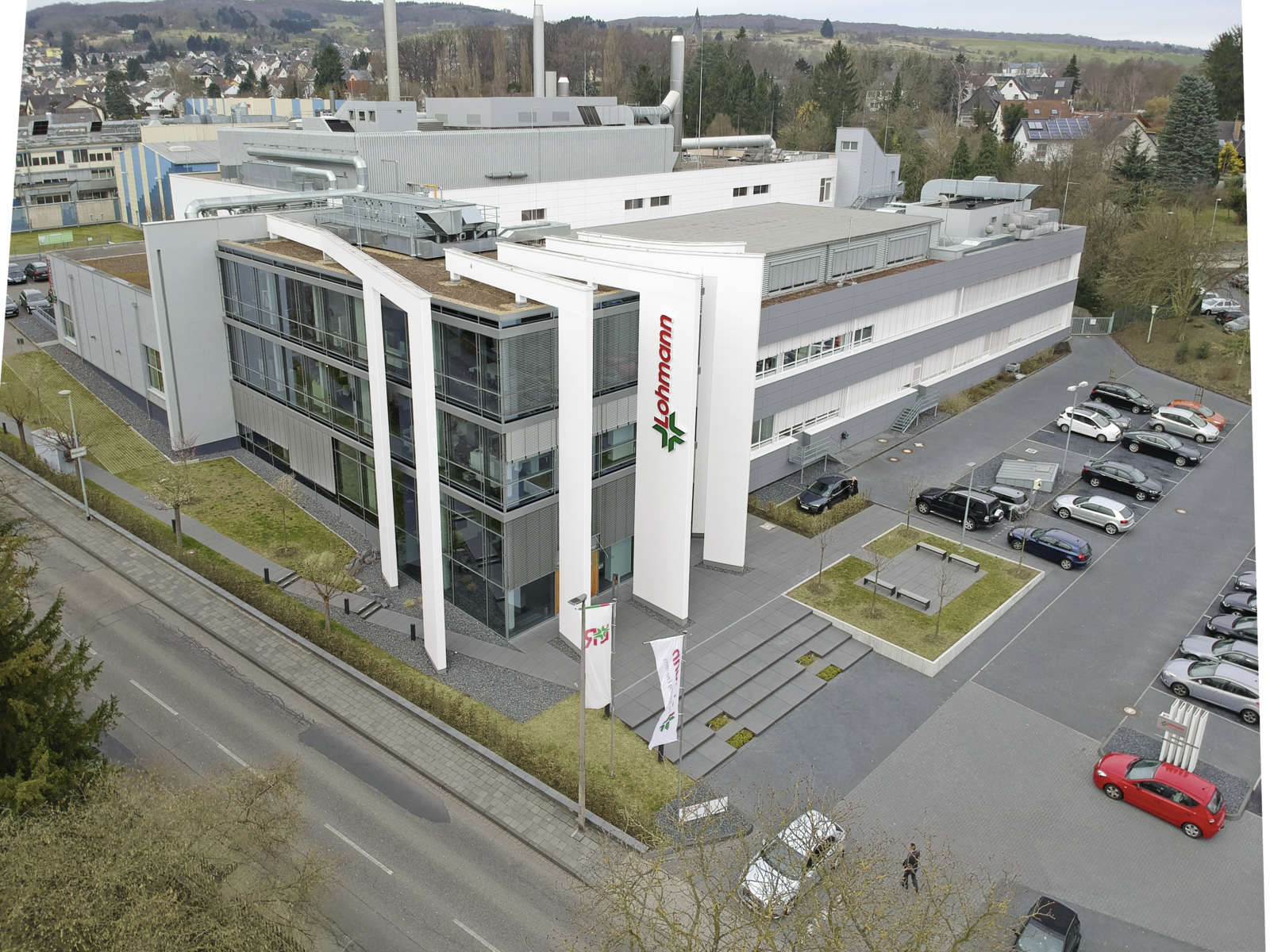 2016 wurde das Technologiezentrum eingeweiht